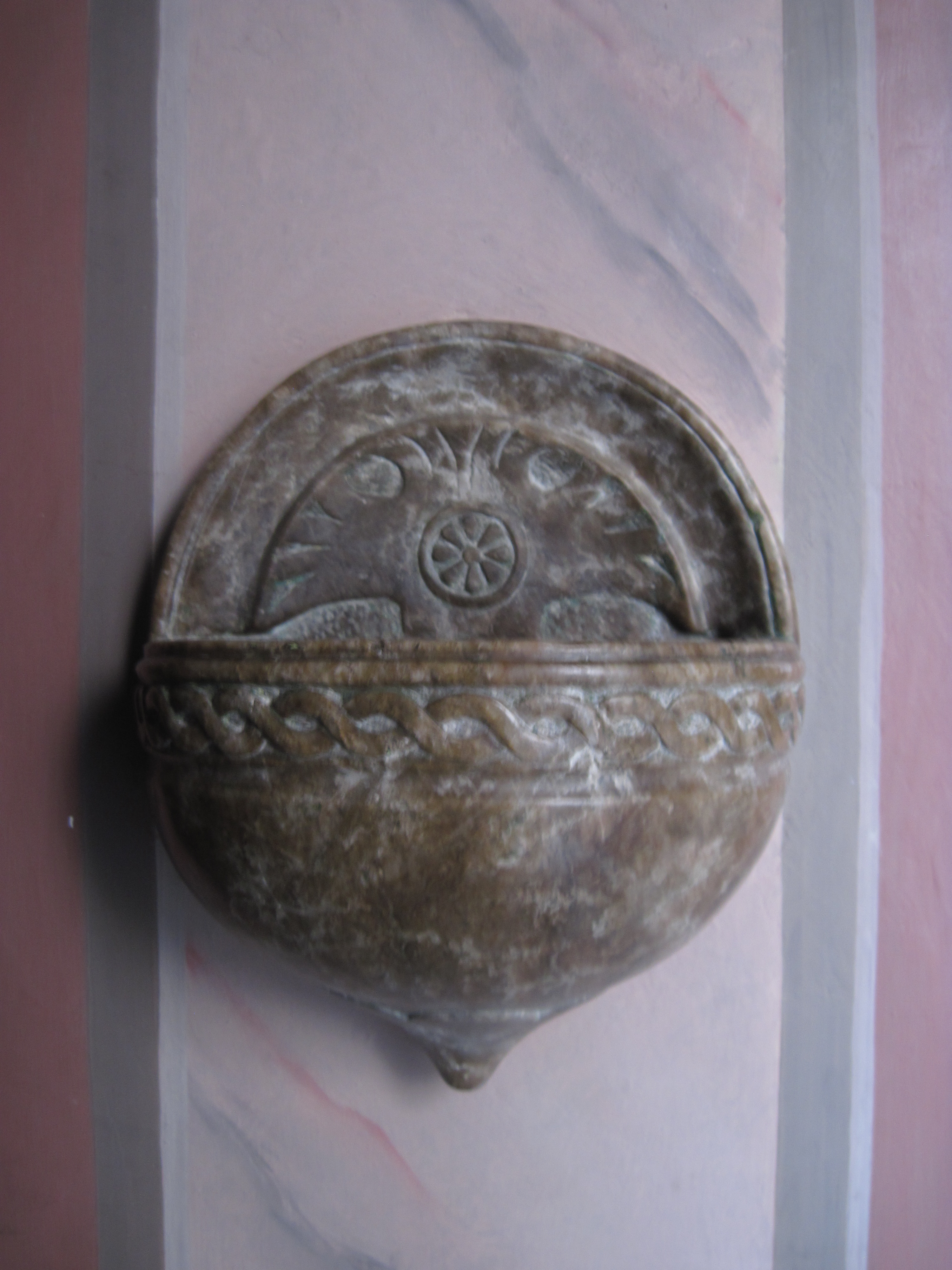 умивальниця, Вірм. церква, Станіслав